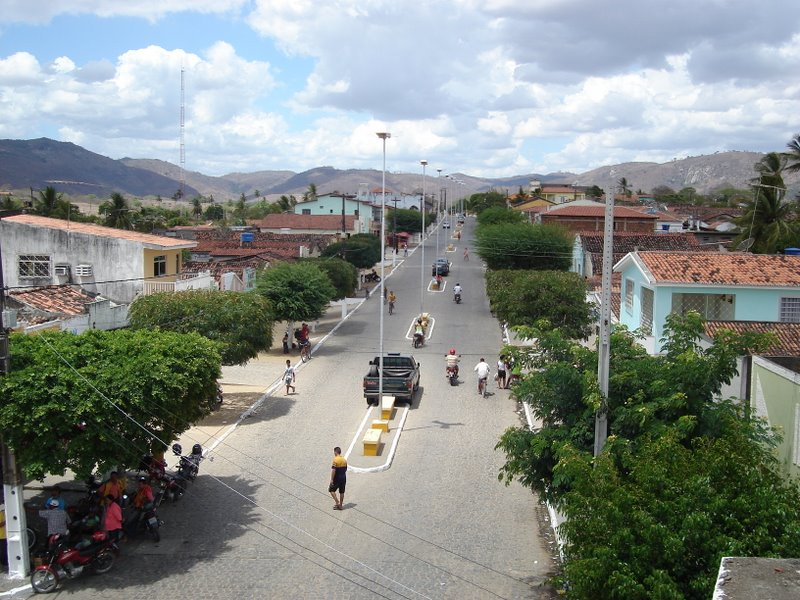 Rua principal de mogeiro